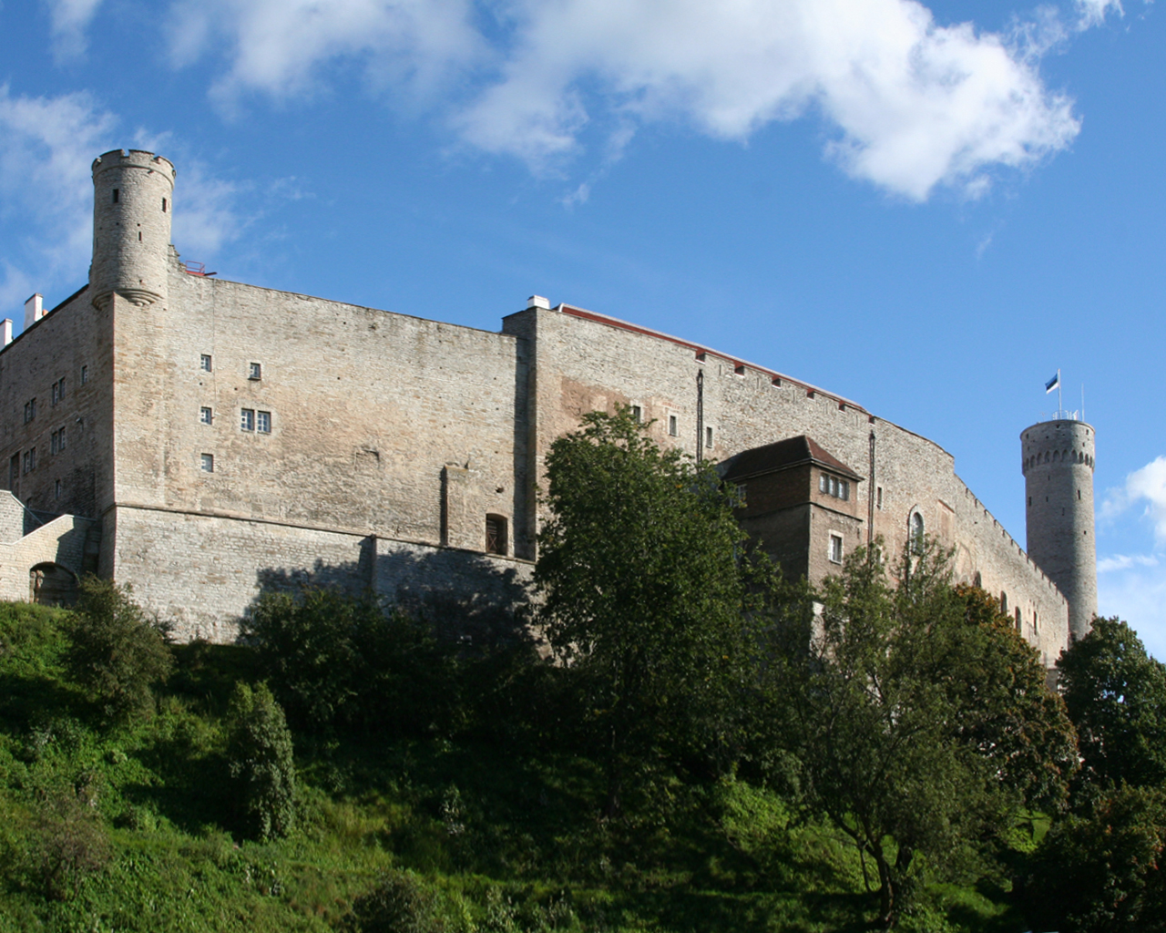 Toompea Castle, Tallinn Estonia